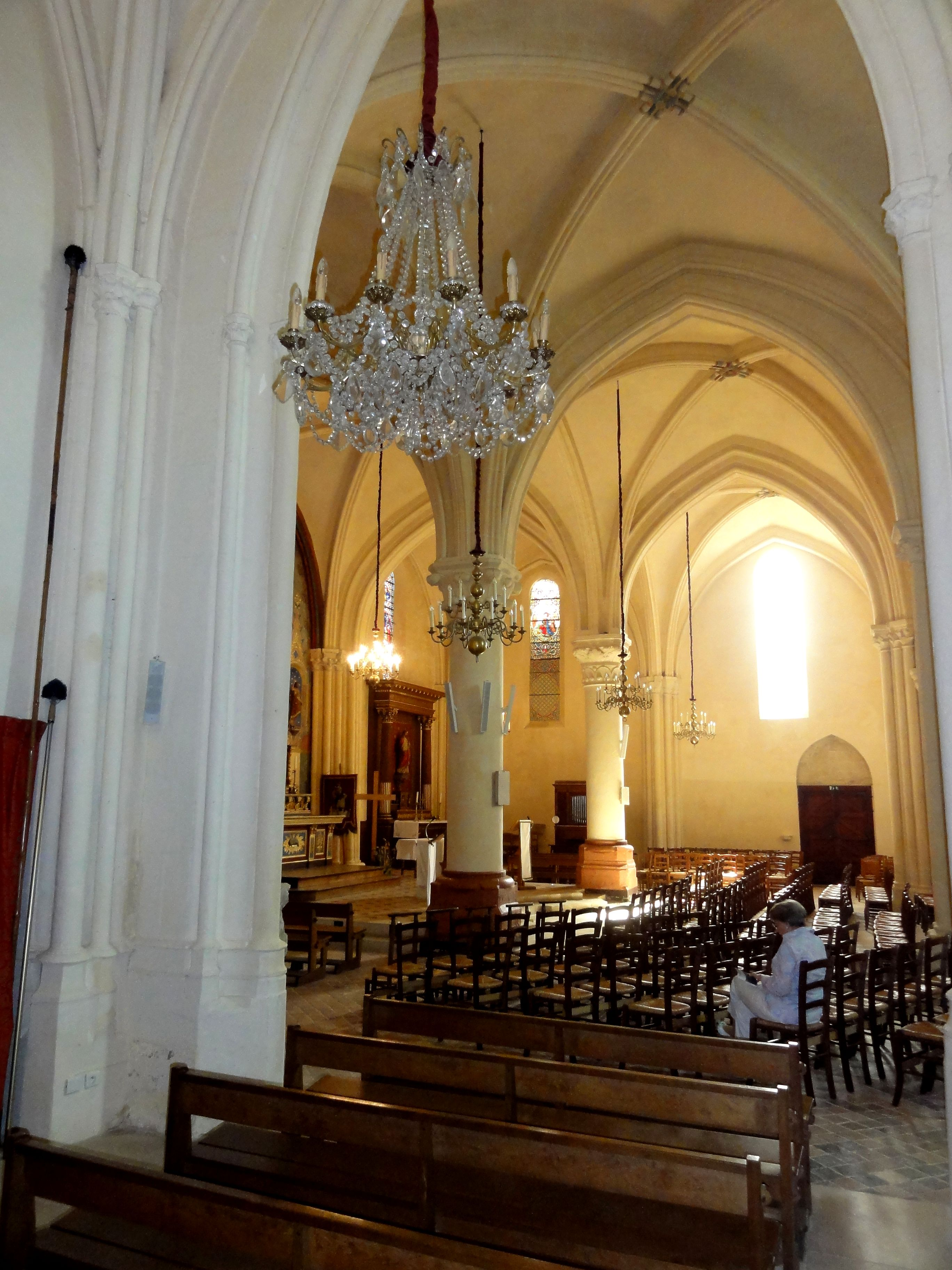 Chapelle du début du XIVe siècle, vue vers le sud.